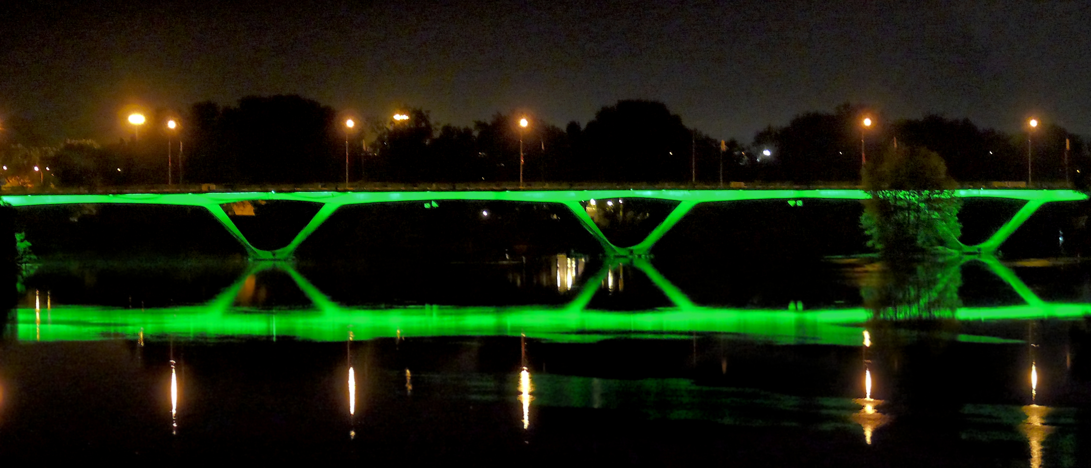 Toulouse (Haute-Garonne, France) - Le pont Saint-Michel de nuit.